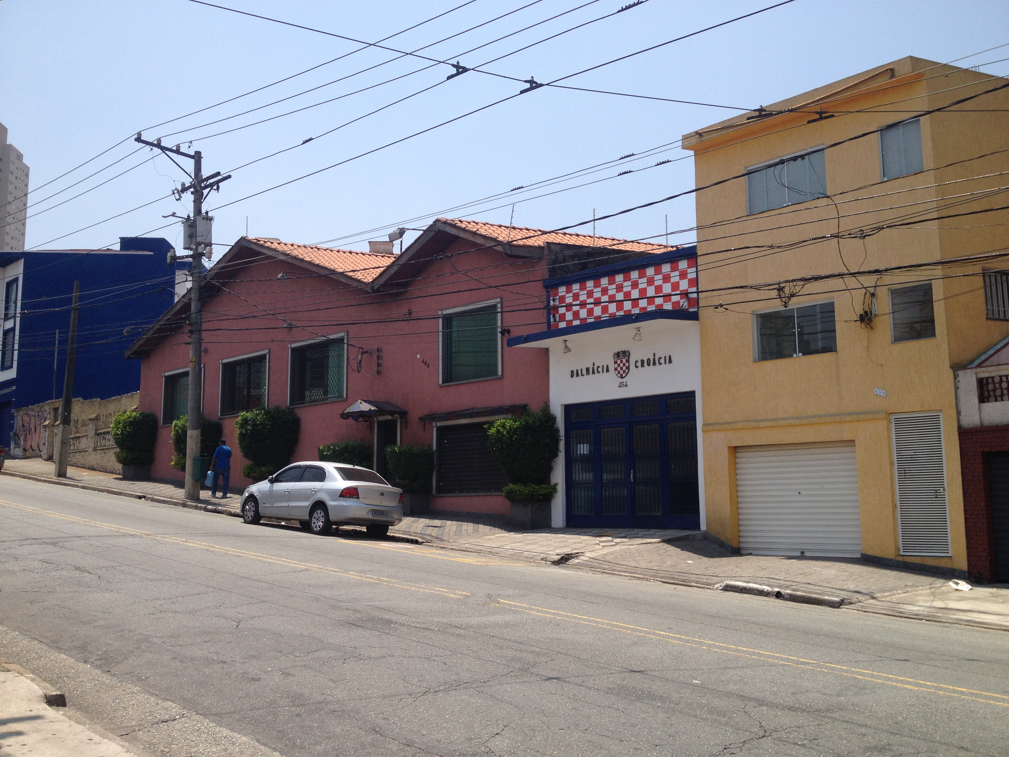 Sede da Associação Amigos da Dalmácia em São Paulo fundada pela comunidade croata.